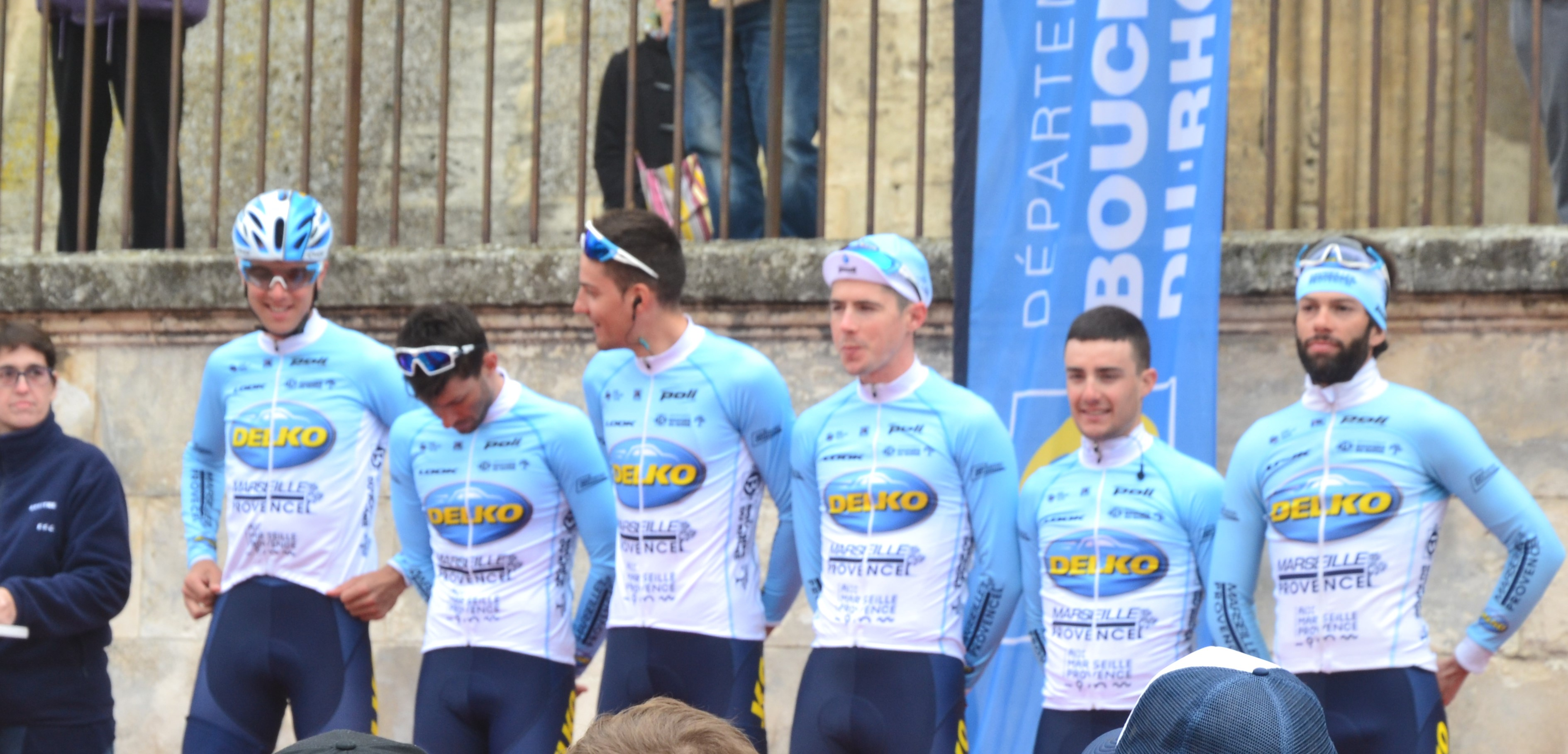 Lors du podium des signatures avant départ de l'étape